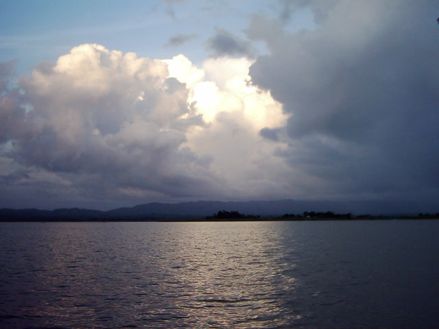 Kaptai Lake, Bangladesh